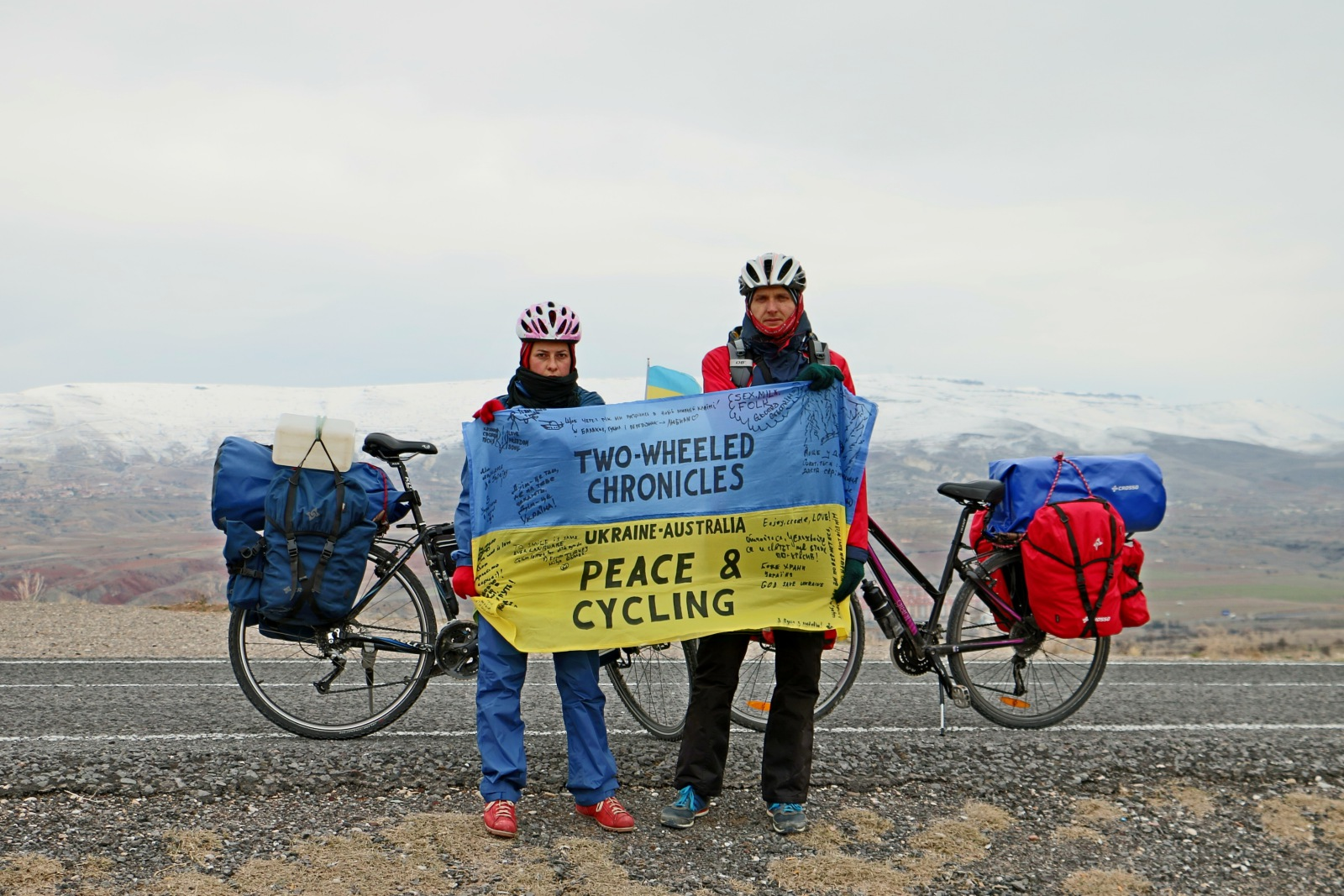 Two-wheeled Chronicles (photo 1)